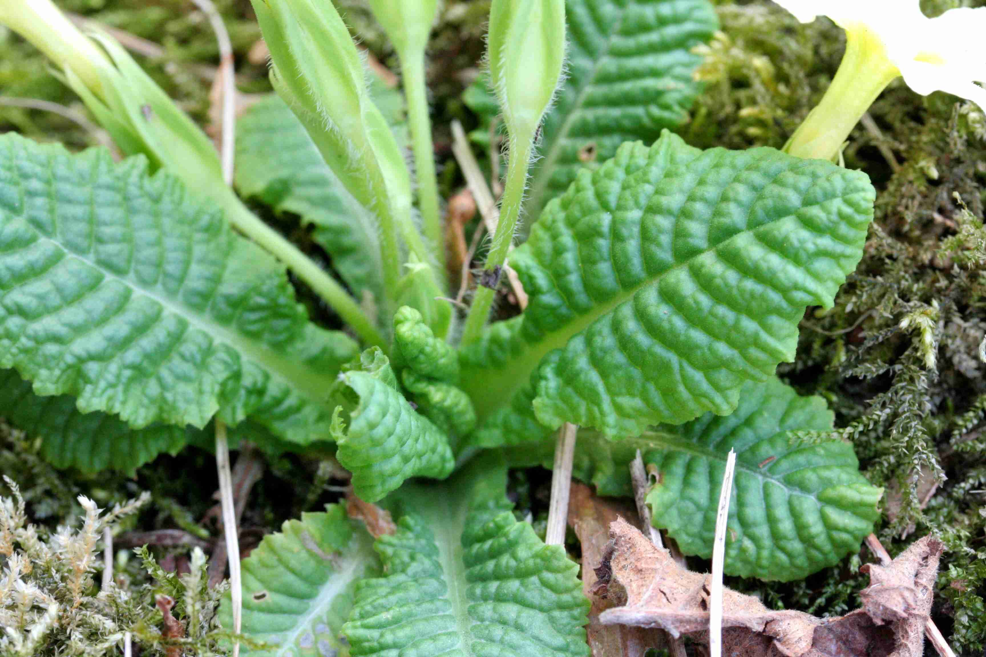 Primula_vulgaris (Primula comune) Località: Corlonch, Trichiana (BL), 580 m s.l.m.